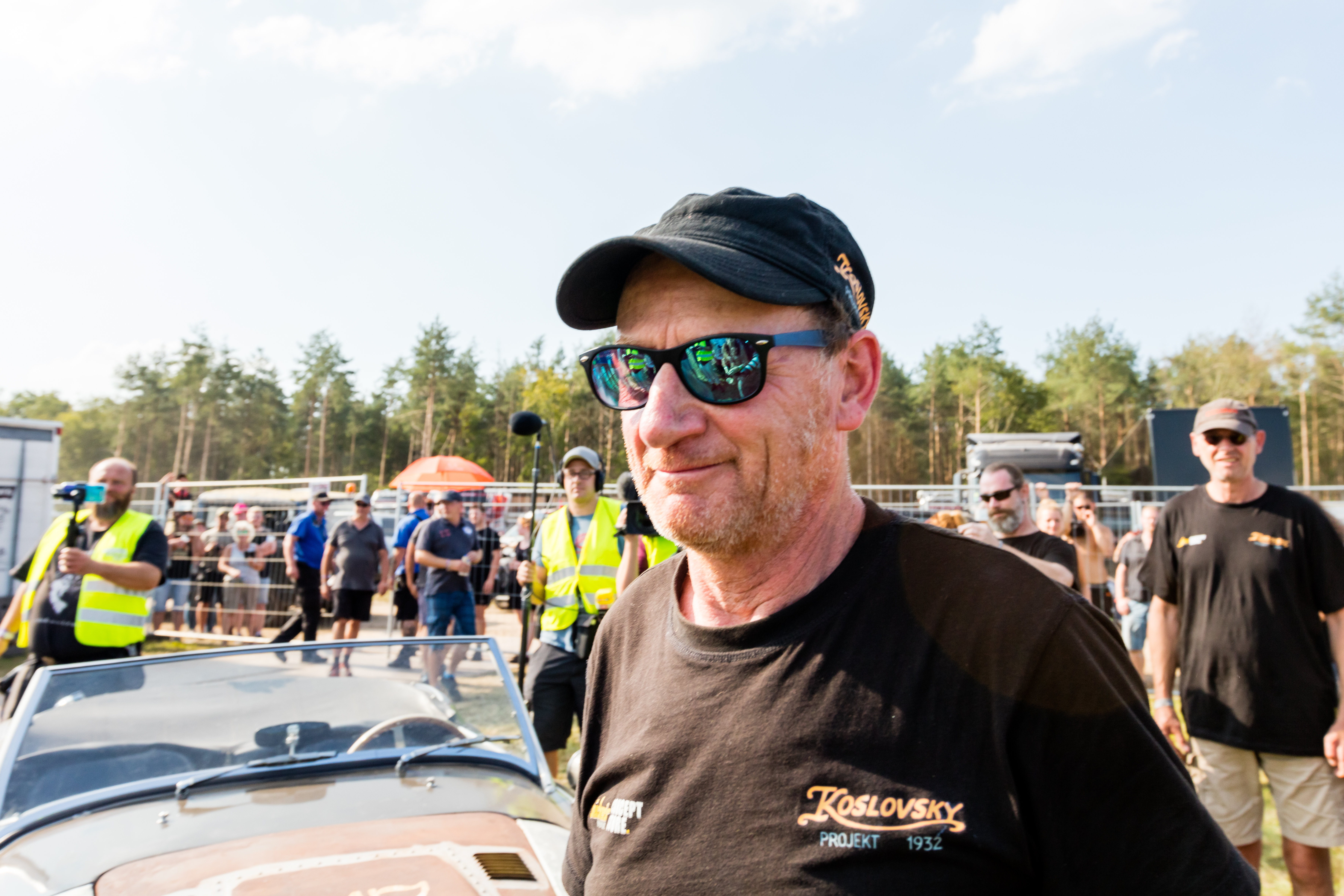 Andi Feldmann vs Konny Reimann during Werner Rennen at Flugplatz Hartenholm, Hasenmoor, Schleswig-Holstein, Germany on 2019-08-31, Photo: Sven Mandel